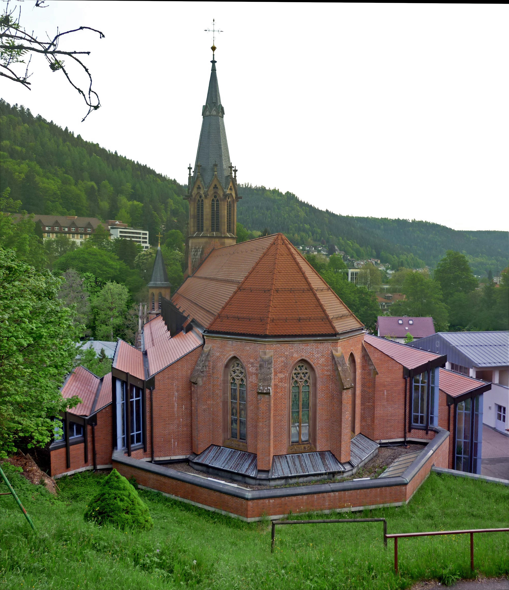 Bad Wildbad, Lkr. Calw (Württemberg) – Kath. Pfarrkirche St. Bonifatius